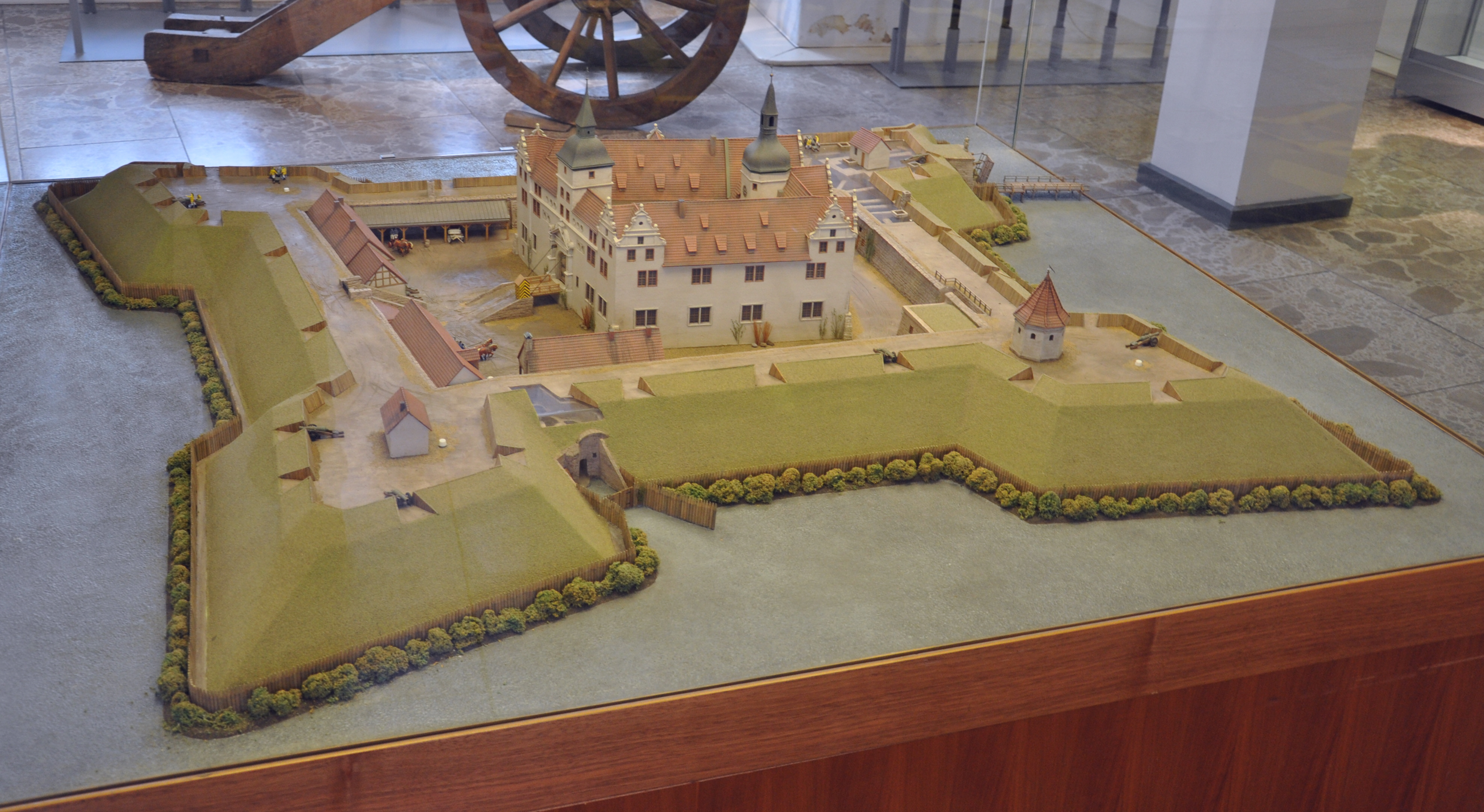 Museum Senftenberg (im Schloss Senftenberg) Modell der Festung Senftenberg